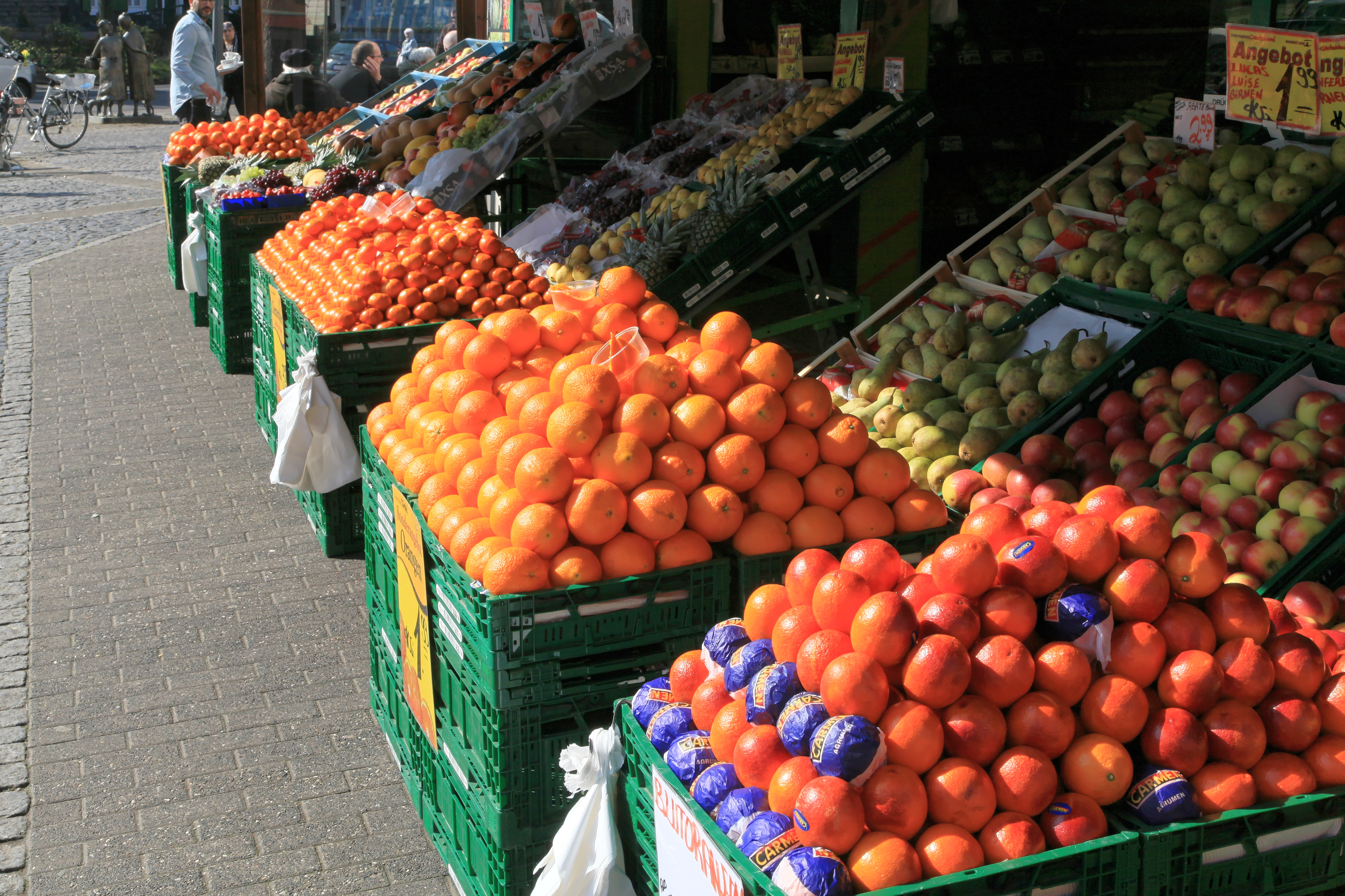 Friedrichstraße in Haan